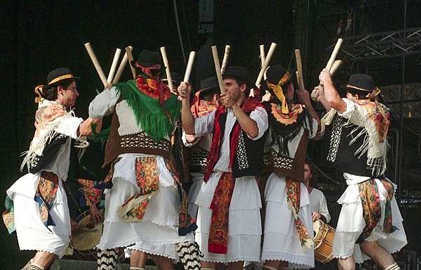 Uma apresentação dos Pauliteiros de Miranda durante a Festa do Avante de 2005.